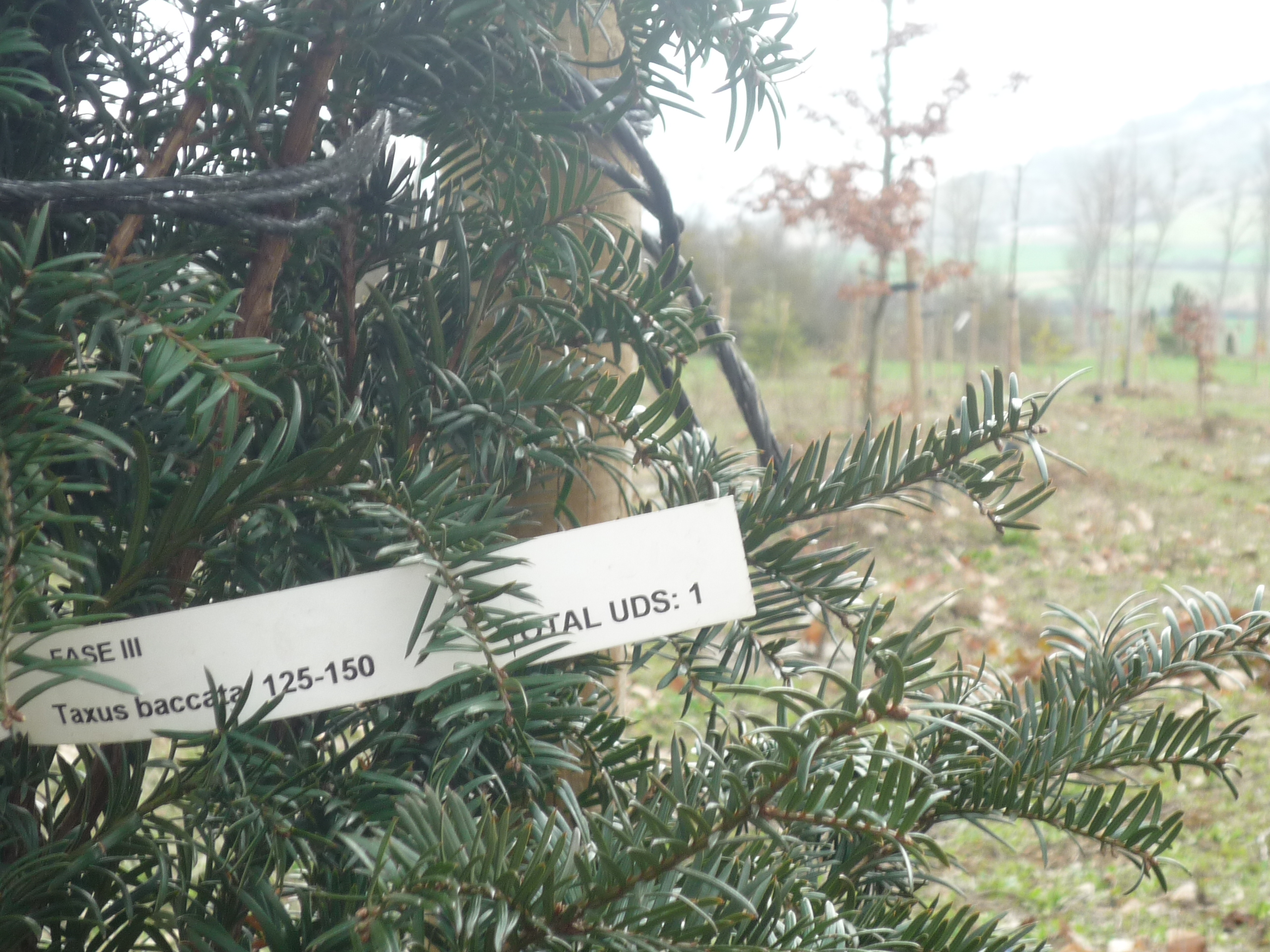 Olarizuko parke botanikoaren irudia, zuhaitz baten etiketa aurrean